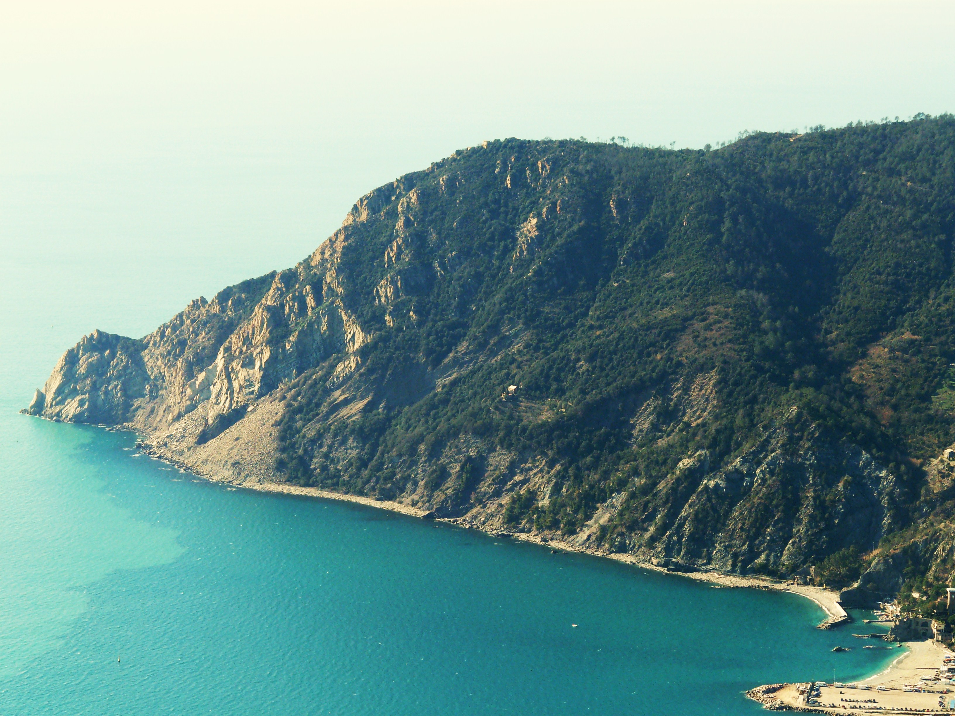 Punta Mesco, Monterosso al Mare, Cinque Terre, La Spezia, Liguria, Italia